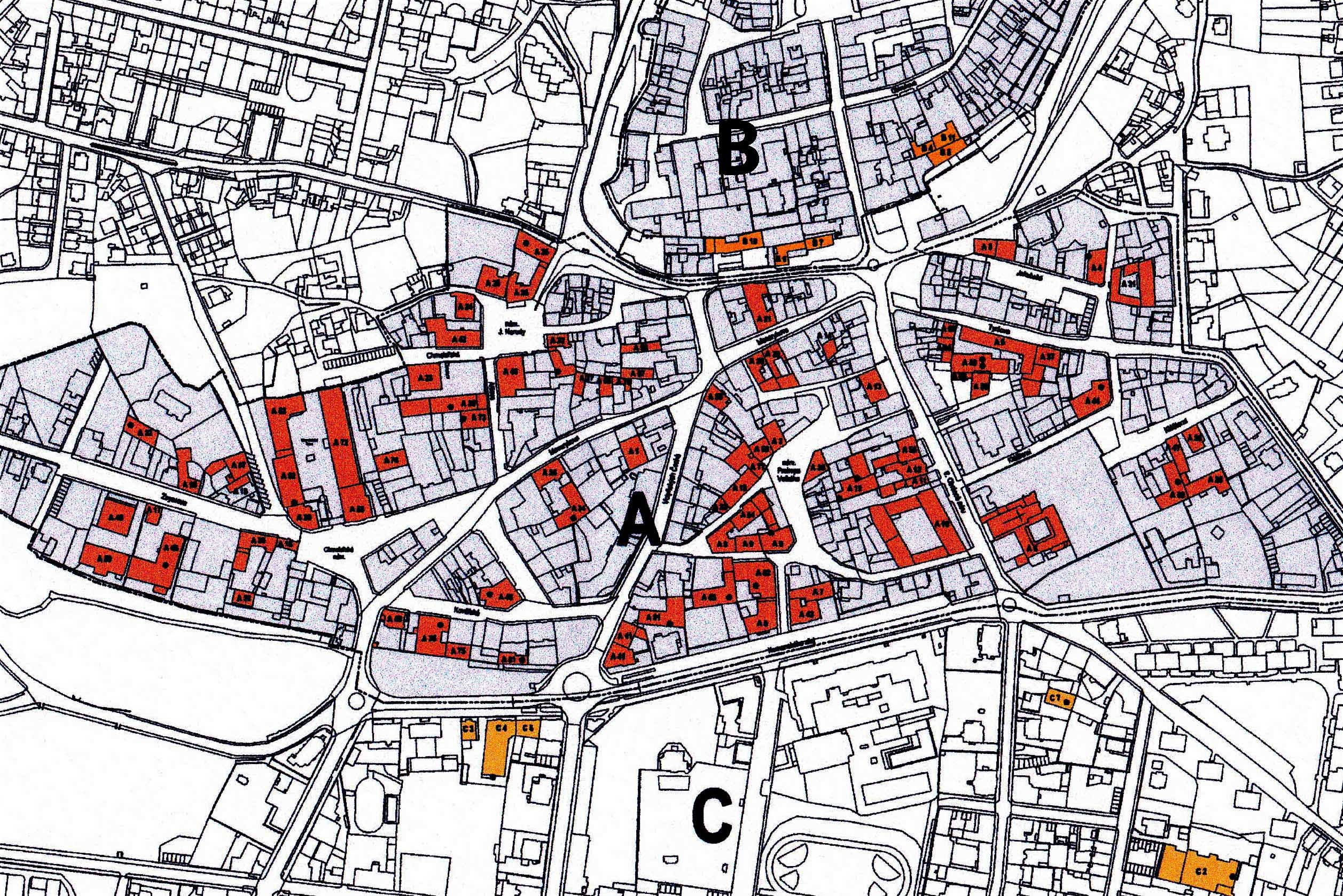 Denkmalzonen für Gebäude der Hopfenverarbeitung und Bierherstellung in Žatec (Saaz) (Památky pěstování a zpracování chmele a výroby piva v Žatci) als Vorschlag zum UNESCO-Weltkulturerbe A = Denkmalzone in der Prager Vorstadt, B = Städtisches Denkmalreservat (Altstadt von Žatec), C = Gebäude in den übrigen Bereichen der Stadt